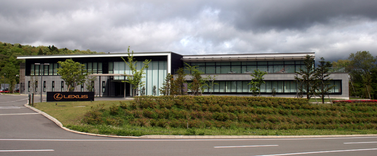 Lexus College